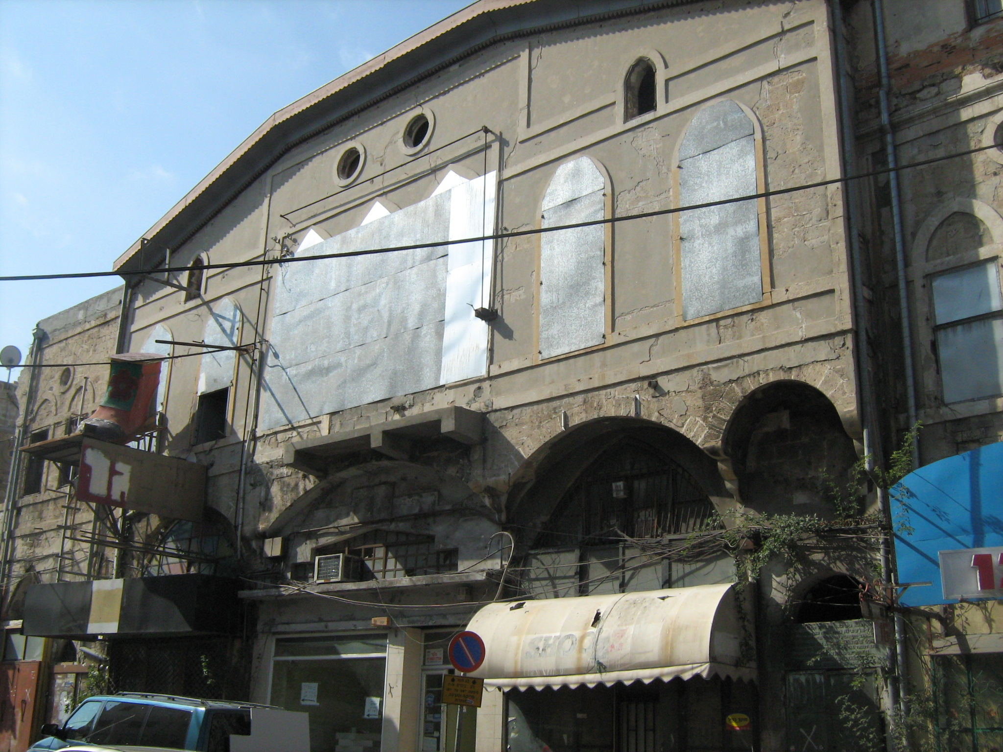 סניף בנק אנגלו-פלסטינה ברח' יפת